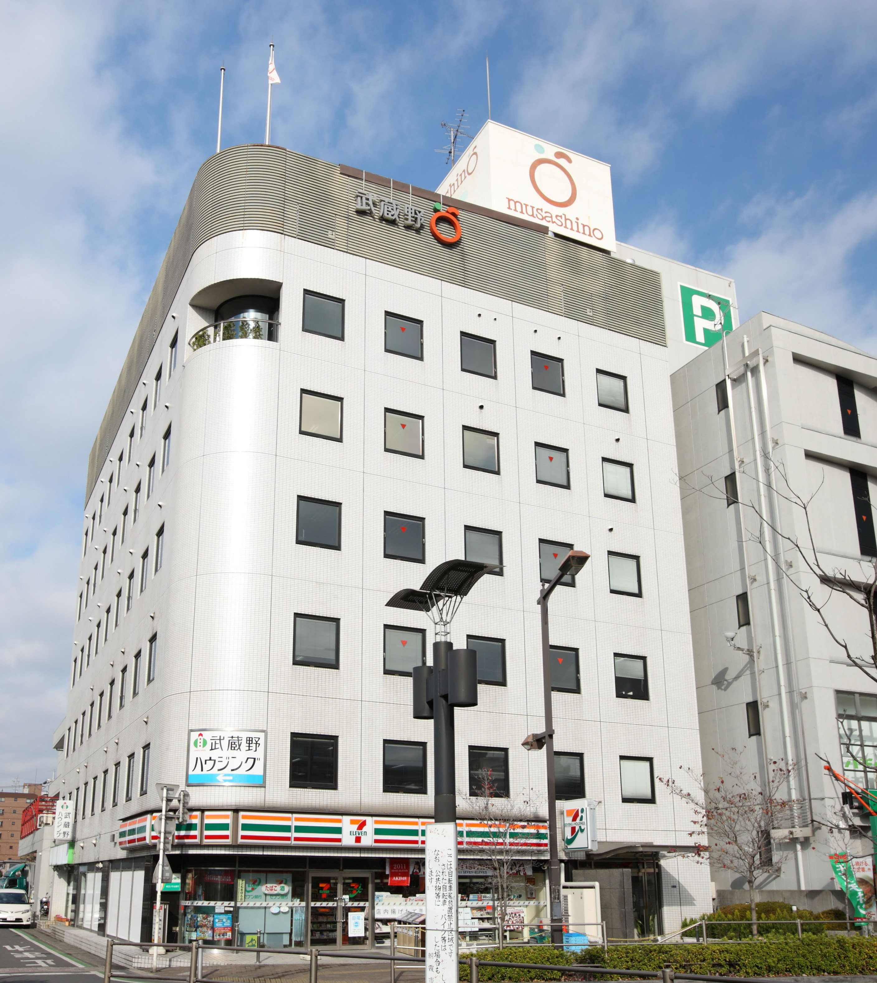 武蔵野本社ビル